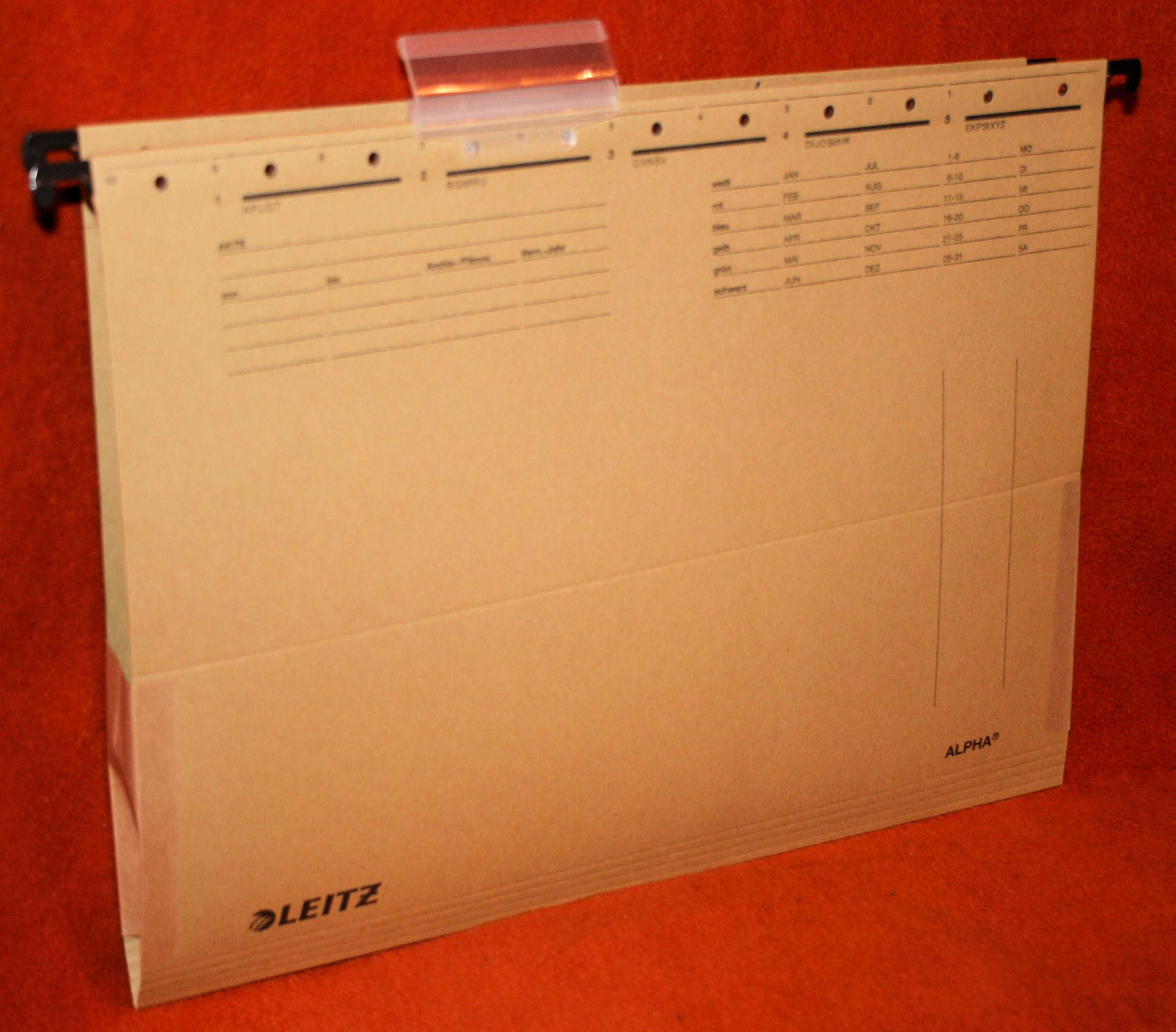 Hängetasche